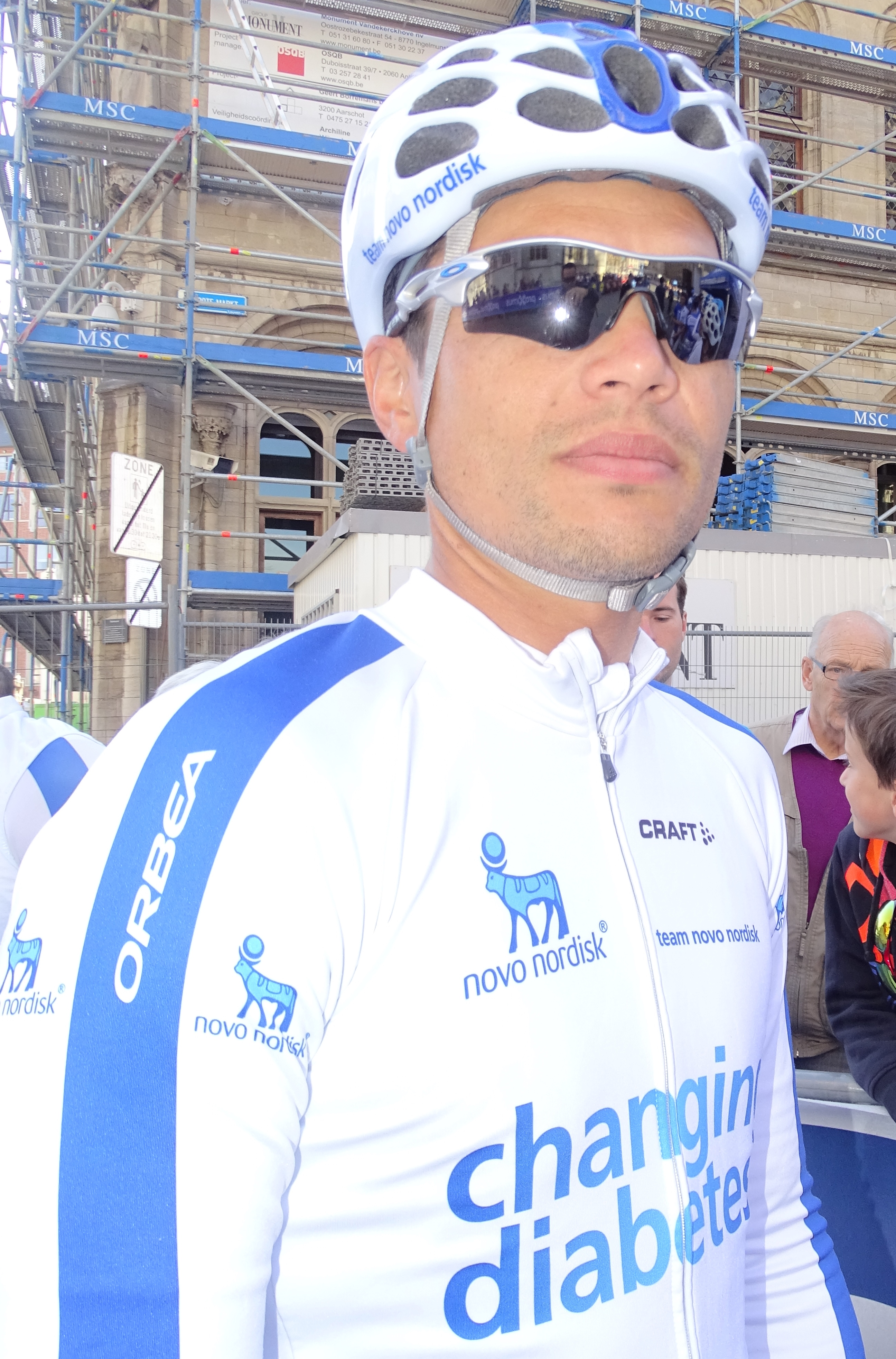 Reportage réalisé le mercredi 15 avril à l'occasion du départ de la Flèche brabançonne 2015 à Louvain, Belgique.